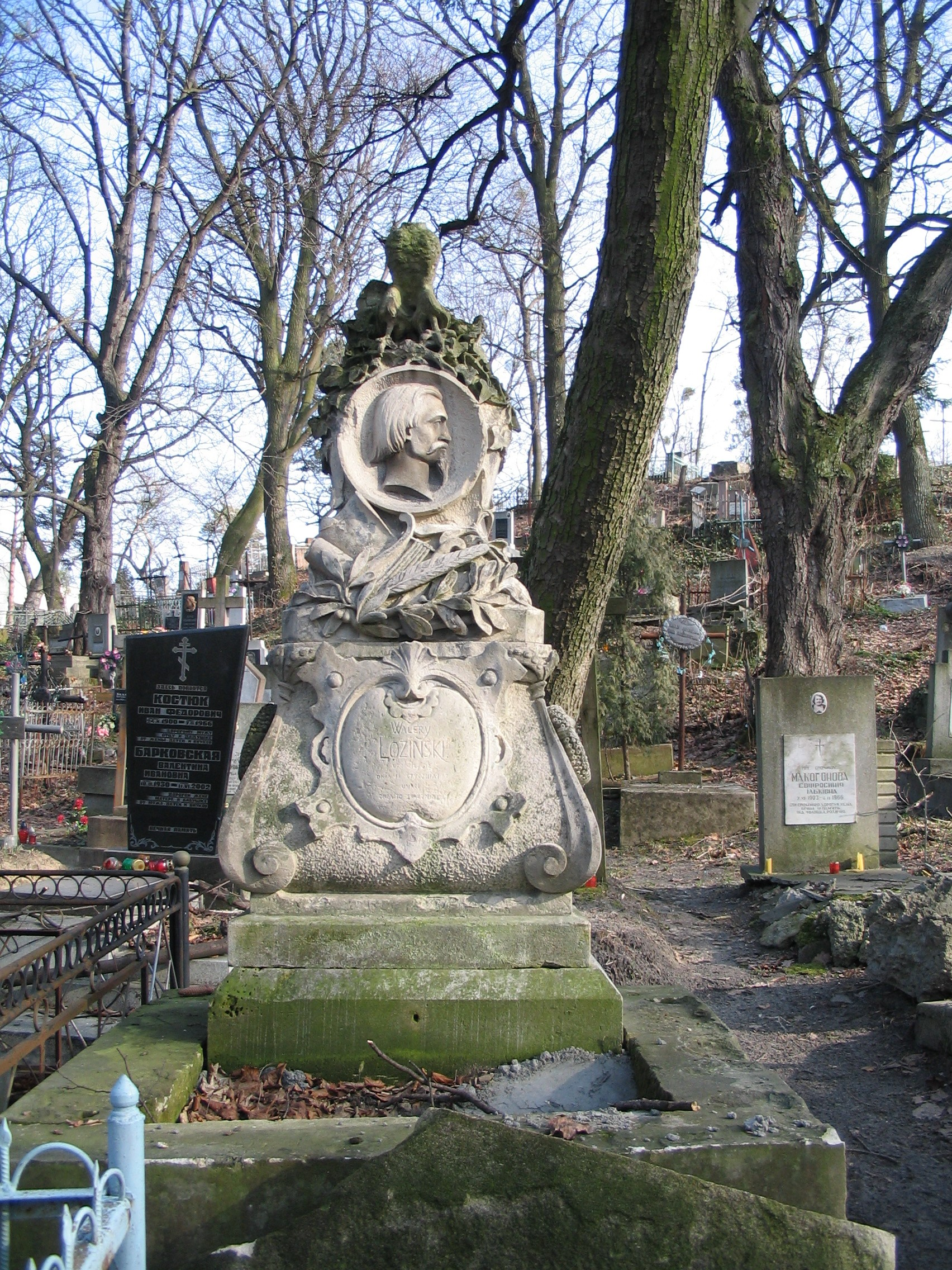 Grób Walerego Łozińskiego na cmentarzu Łyczakowskim we Lwowie. Pomnik ufundowany przez władze miasta Lwowa. Stan w roku 2007.